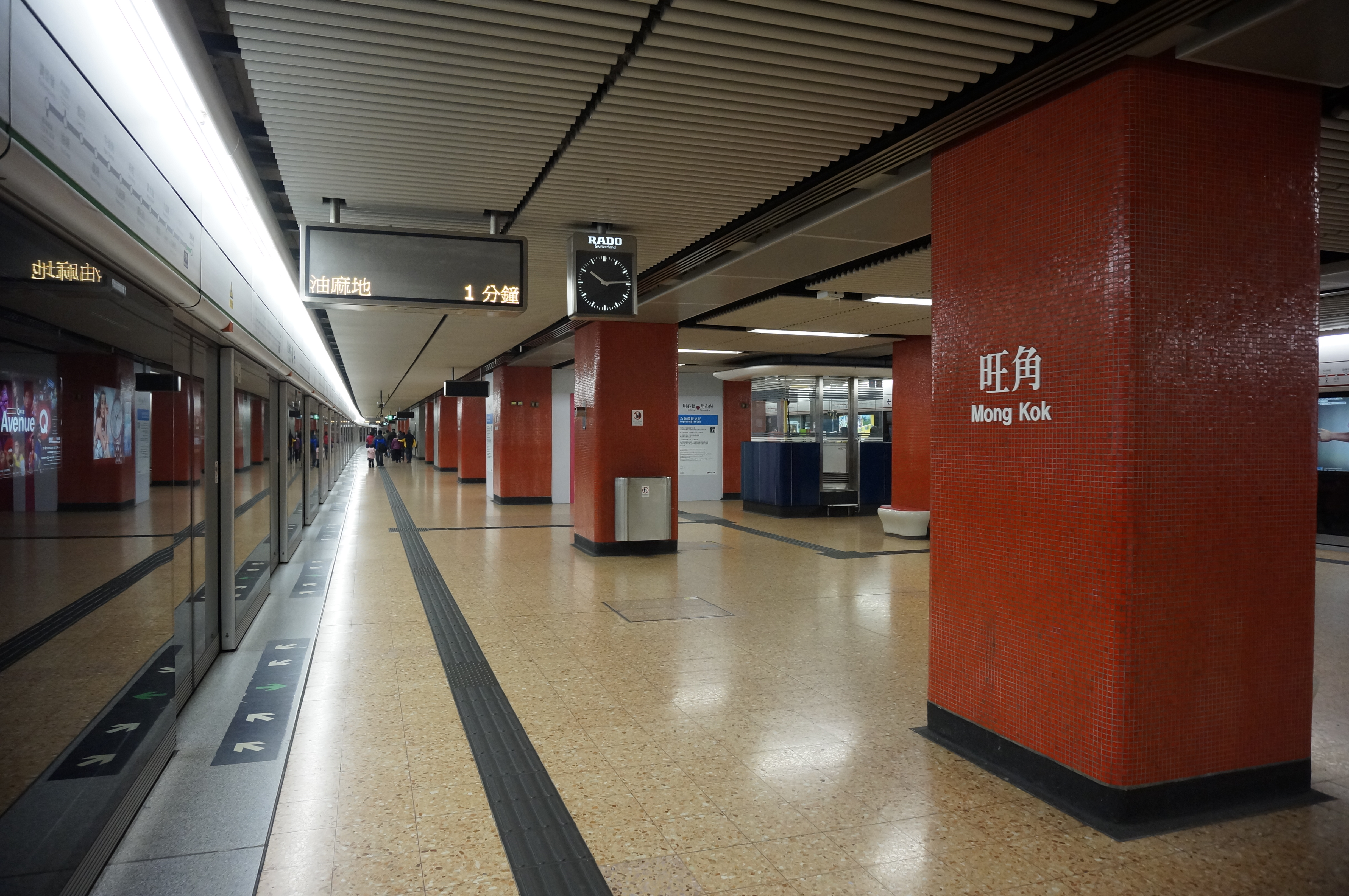 港鐵旺角站月台